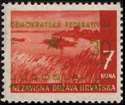 Почтовая марка Демократической Федеративной Югославии (Сплит)